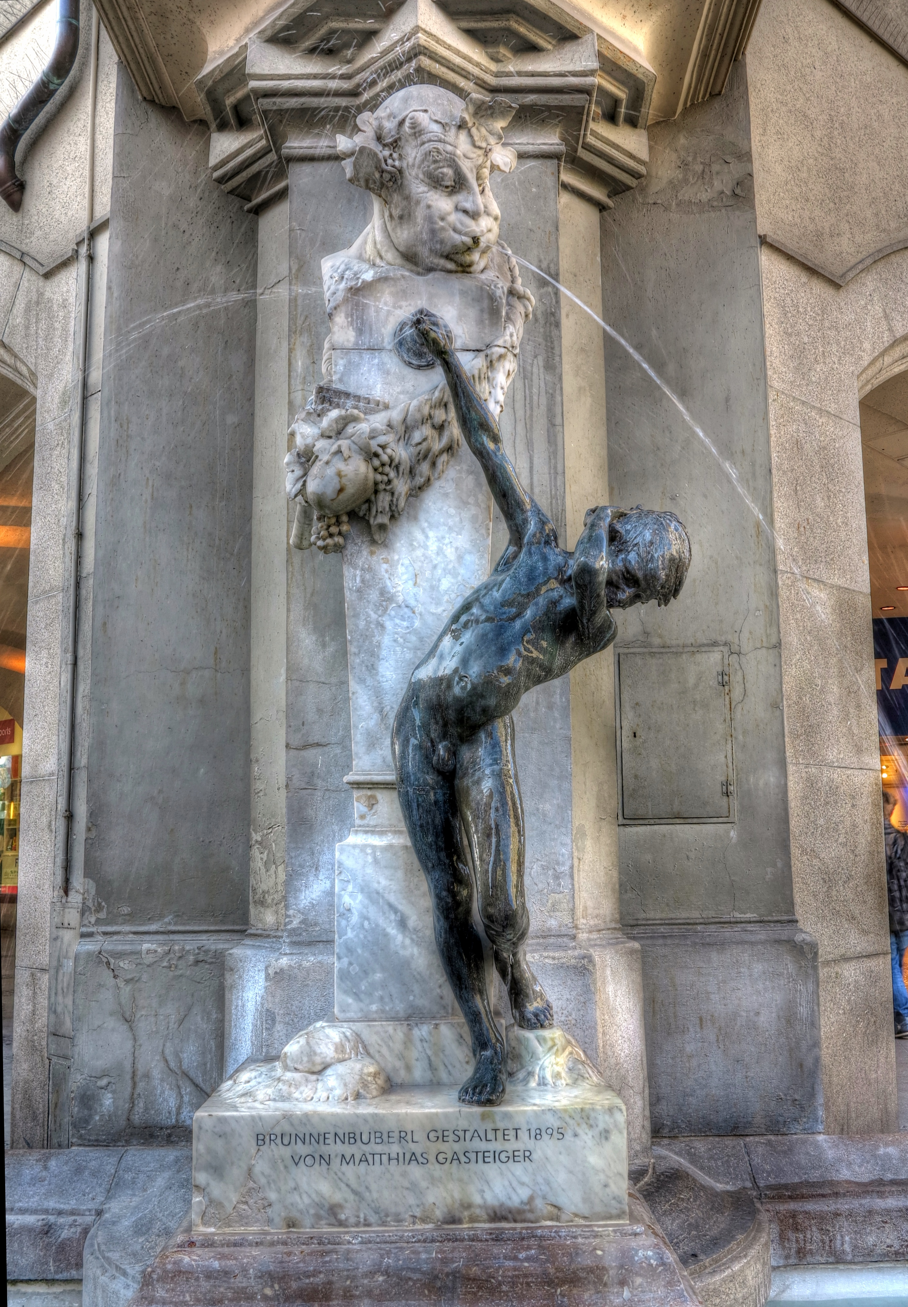 Deutschland, Bayern, München, Zentrum, Fußgängerzone, "Brunnenbuberl" von Matthias Gasteiger, Neuhauser- Ecke Max-Ernst-Straße (HDR)